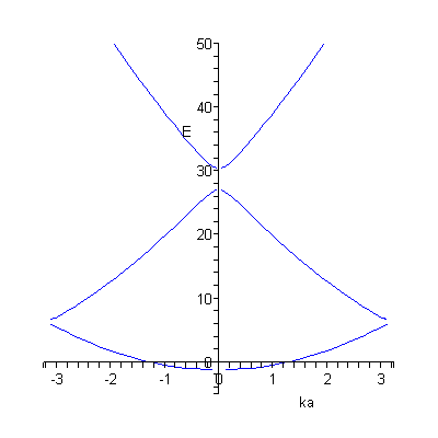 Периодический потенциал